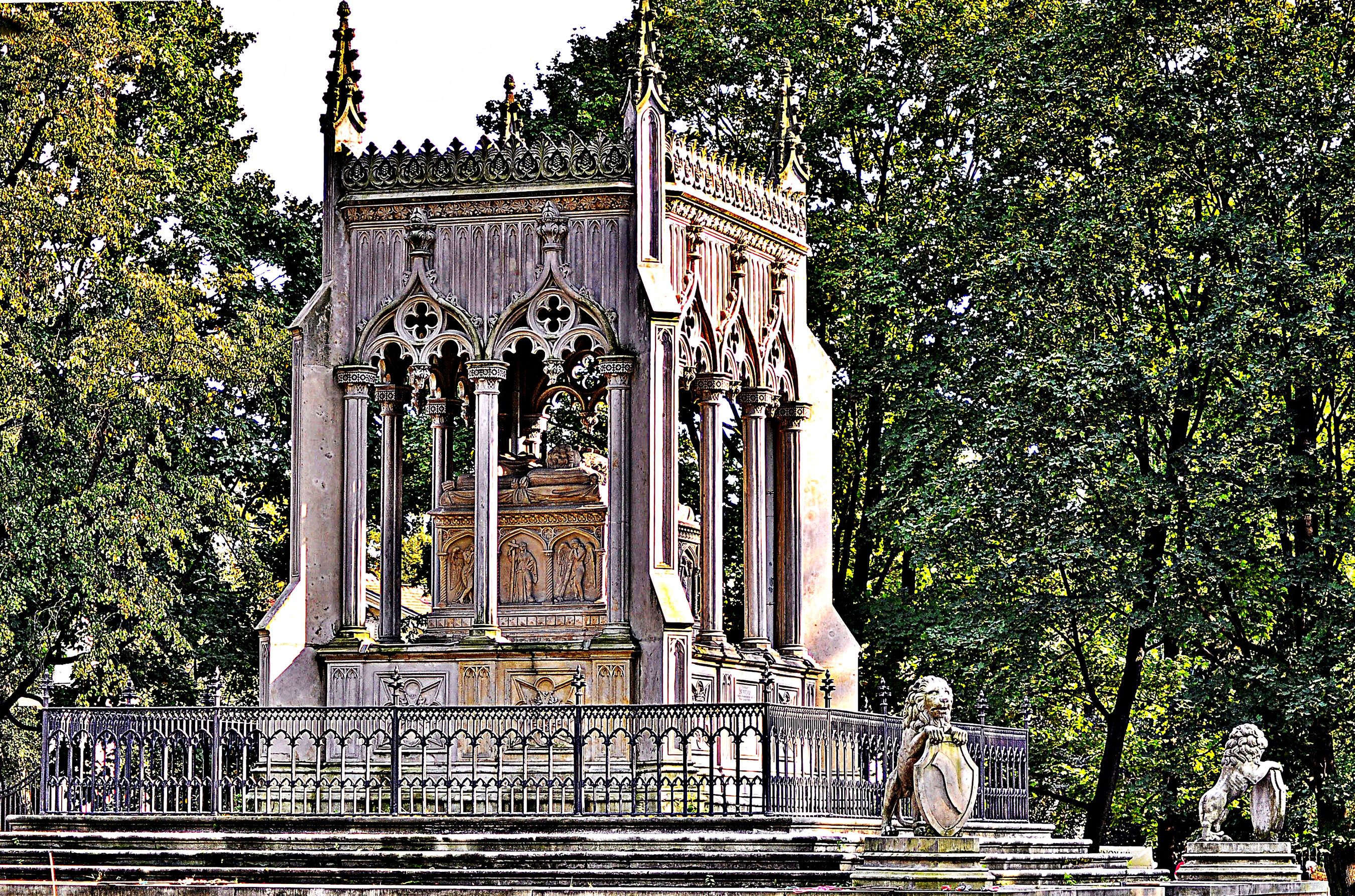 Mauzoleum Potockich w Wilanowie.